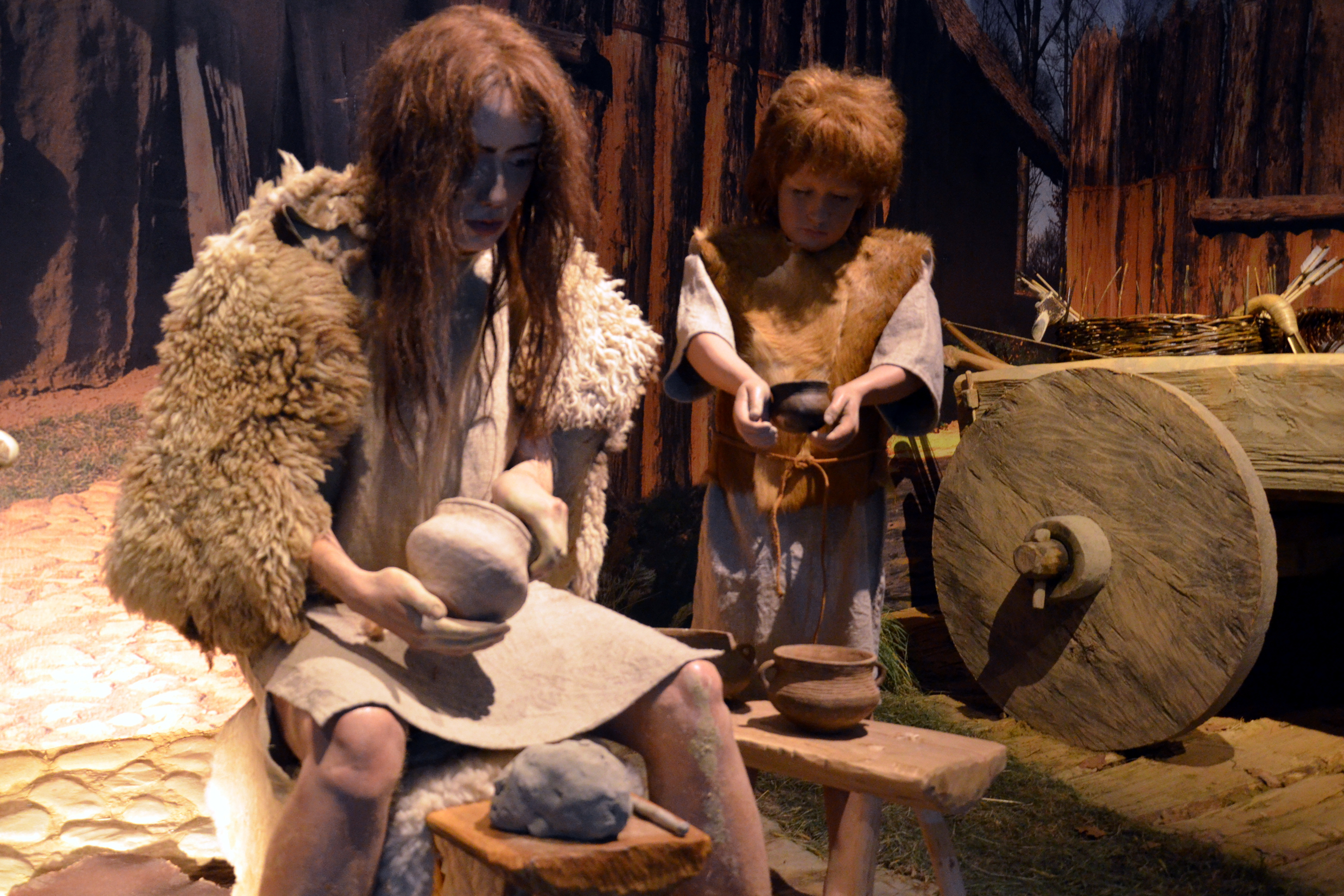 Tracht der Bronzezeit, um etwa von 2100 bis 1650 v. Chr., Beskiden